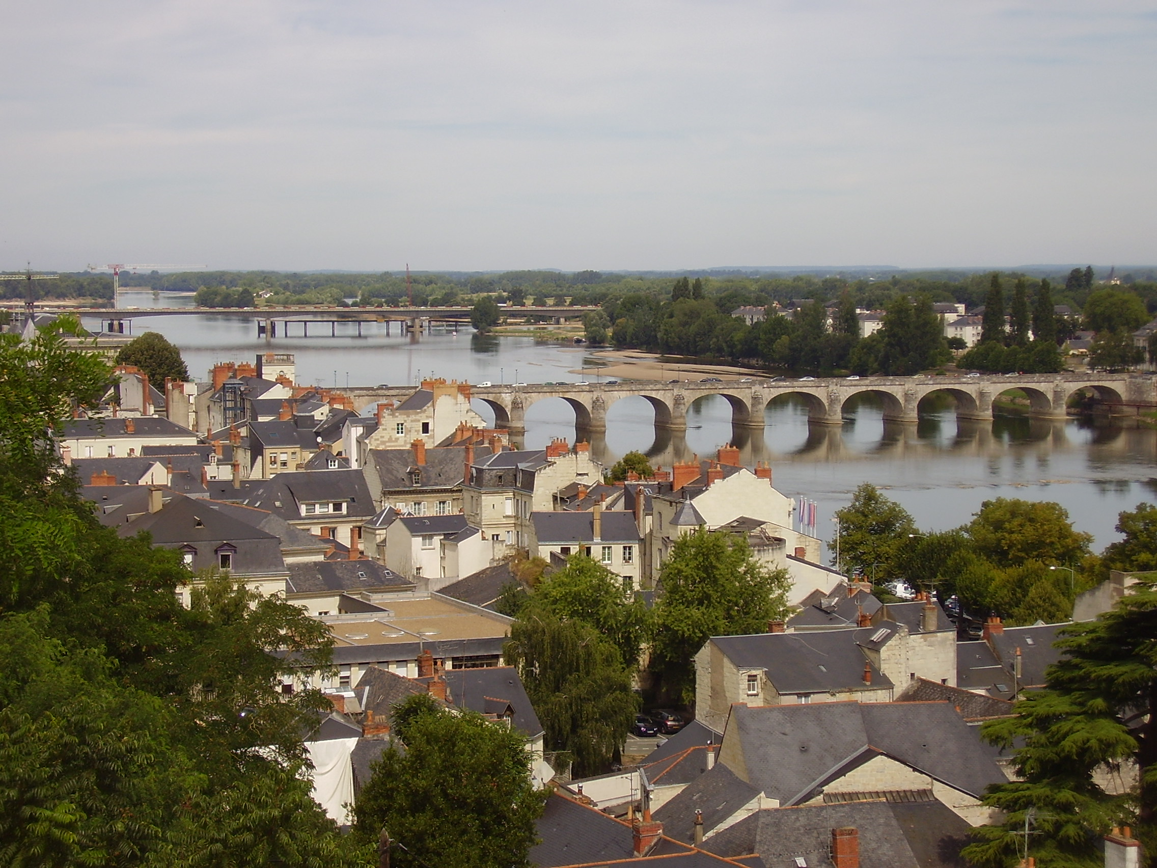 Vue sur la Loire et ses ponts à Saumur (Maine-et-Loire, France).